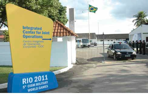 Na fase operativa, o Centro Integrado de Operações Conjuntas (CIOC) dos V JMM foi sediado na Companhia de Comando da 1ª DE, na Vila Militar.